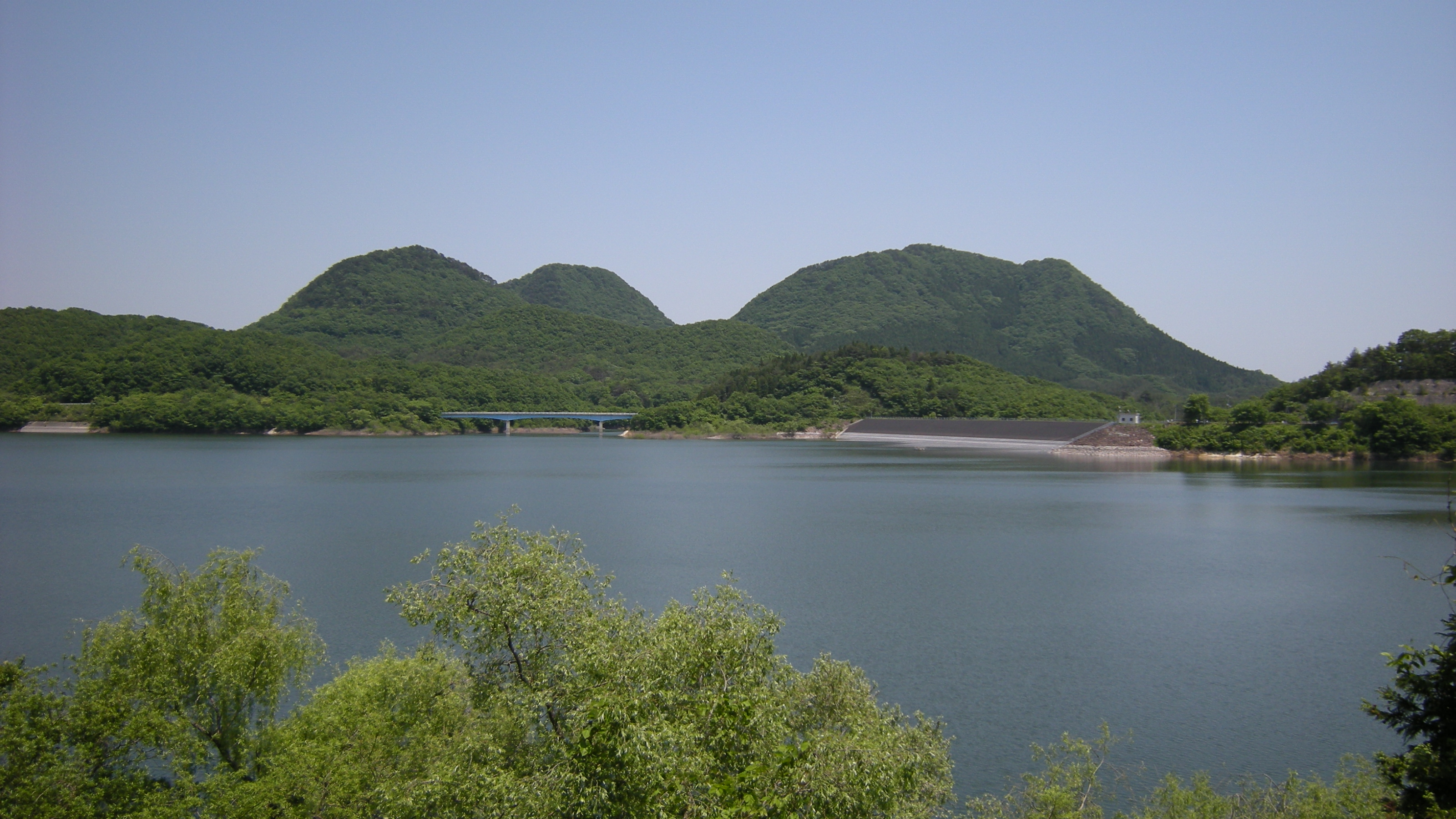 宮城県黒川郡大和町の南川ダムの鞍部ダム（貯水位を稼ぐ目的で周辺地形の低標高部分をふさいで水が逃げ出ないようにするダム）の堤体（写真右半分）。 左の青い橋は兵士ケ原橋。 手前の湖は南川ダムのダム湖の七ツ森湖。 背景は、七ツ森の山々で、左から順に蜂倉山、大倉山、撫倉山。 七ツ森大橋の北側のたもとより、東に向いて撮影。